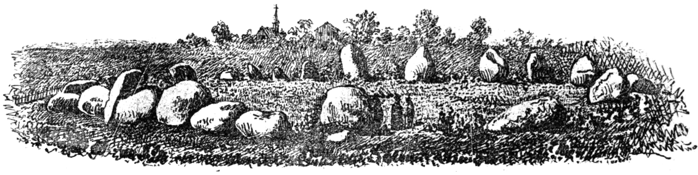 Tingsstället i Nässja i Östergötland. Teckning i "Utdrag af Antiqvitets-Intendenten P. A. Säves afgifna berättelse för år 1861", publicerad i Antiqvarisk tidskrift för Sverige band 1, 1864.